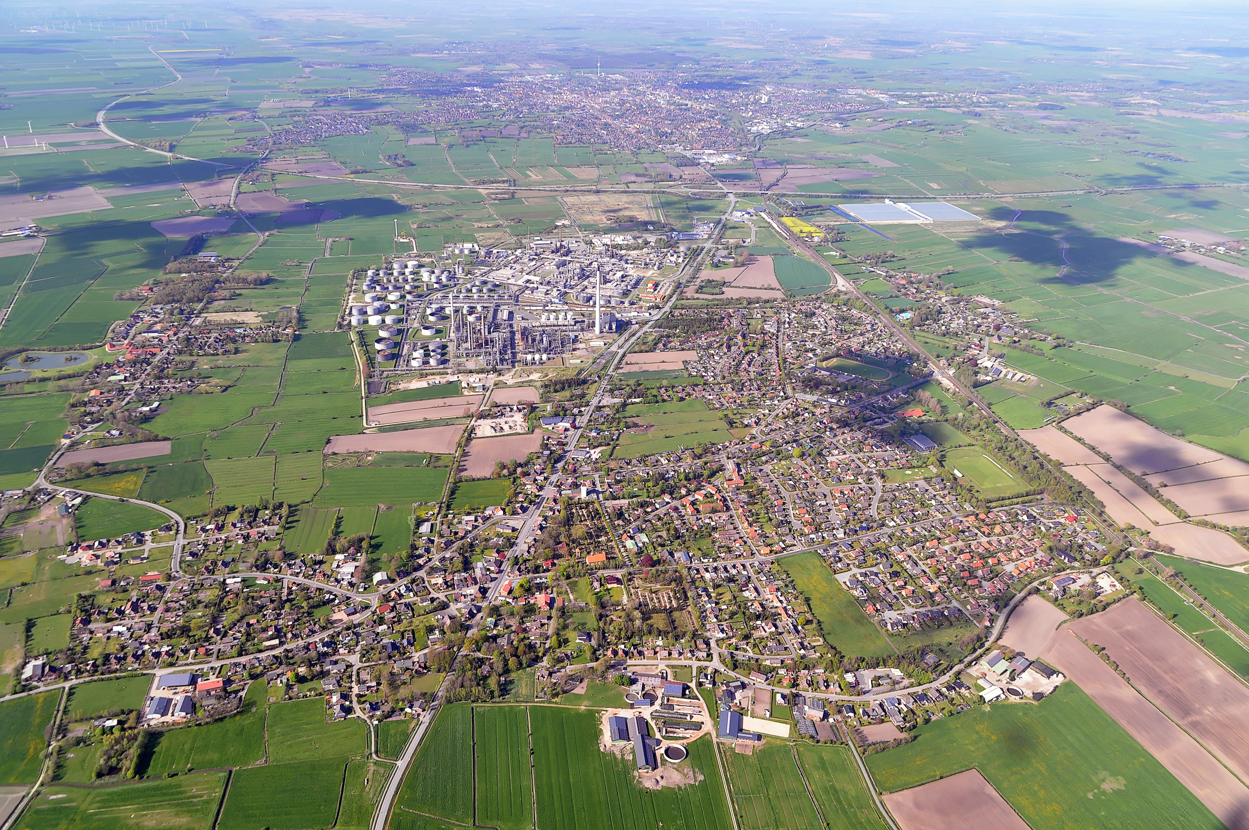 Luftbilder von der Nordseeküste 2012-05